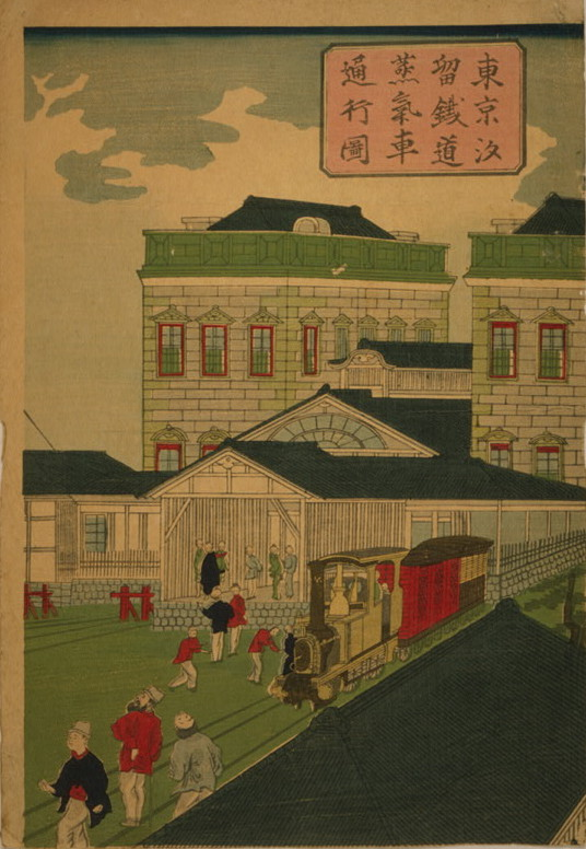 Tōkyō shiodome tetsudō jōkisha tsūkō no zu 東京汐留鉄道蒸気車通行図